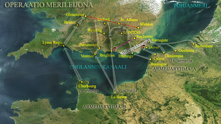 Operation Seelöwe